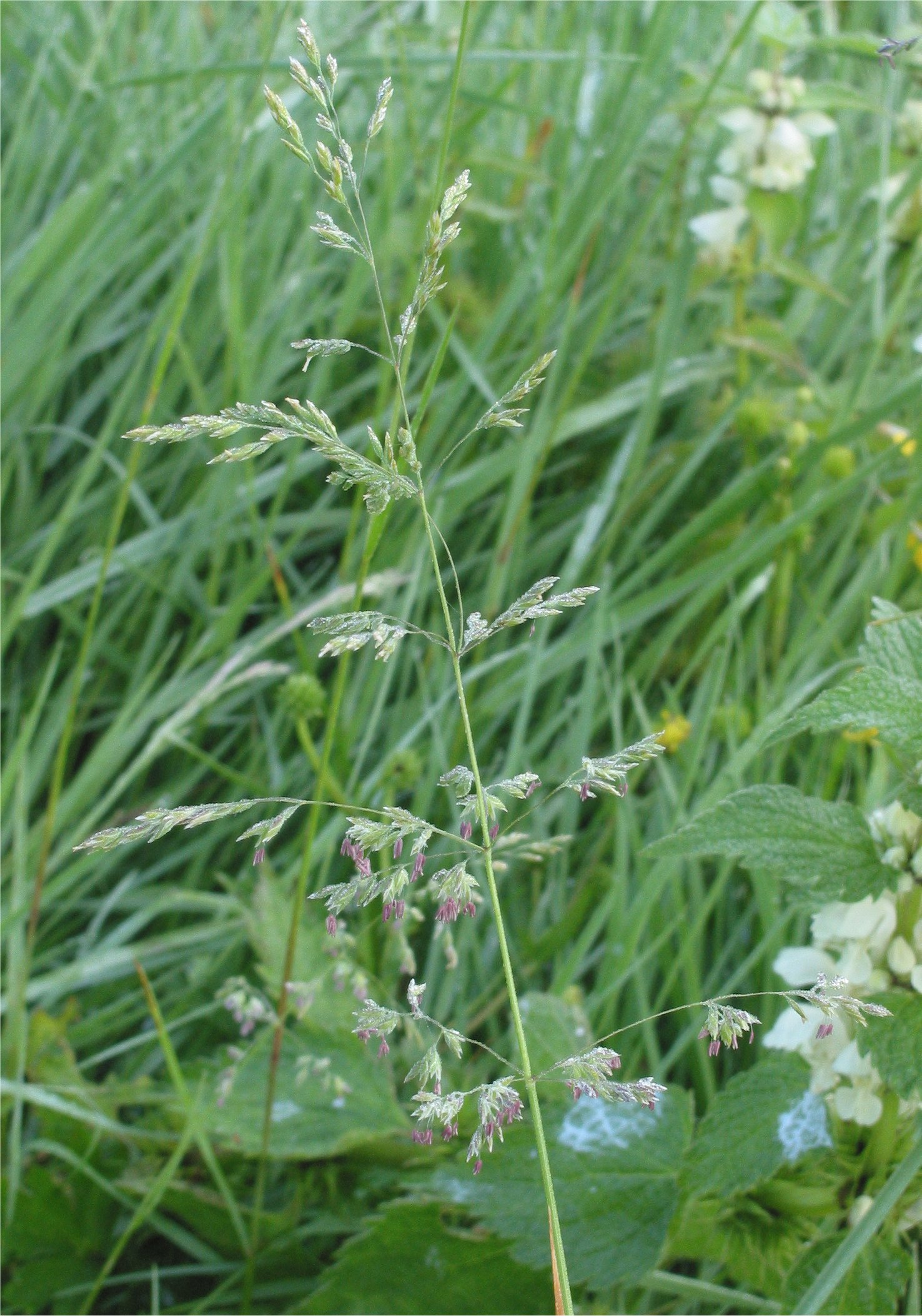 (Gewoon struisgras bloeiwijze) Agrostis tenuis